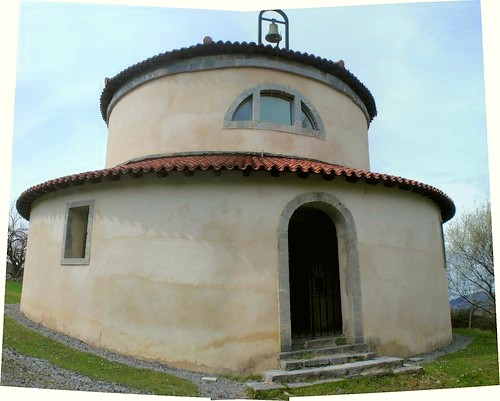 San Isidro baseliza, Erdoizta, Gipuzkoa. (Aldiri, 2010)